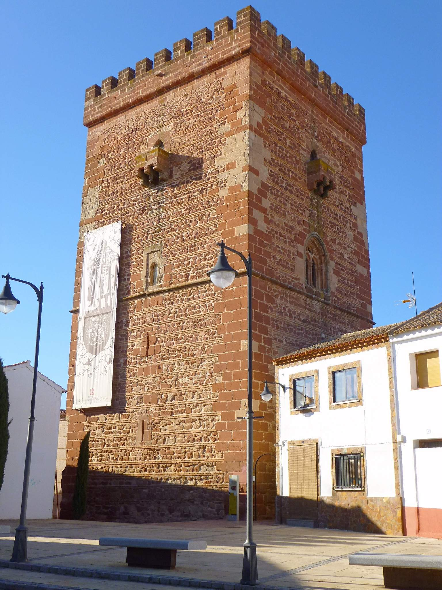 Torreón de Don Juan de Austria y Museo de la Orden de San Juan. Forma parte del Conjunto Palacial del Gran Prior, en Alcázar de San Juan (Ciudad Real)